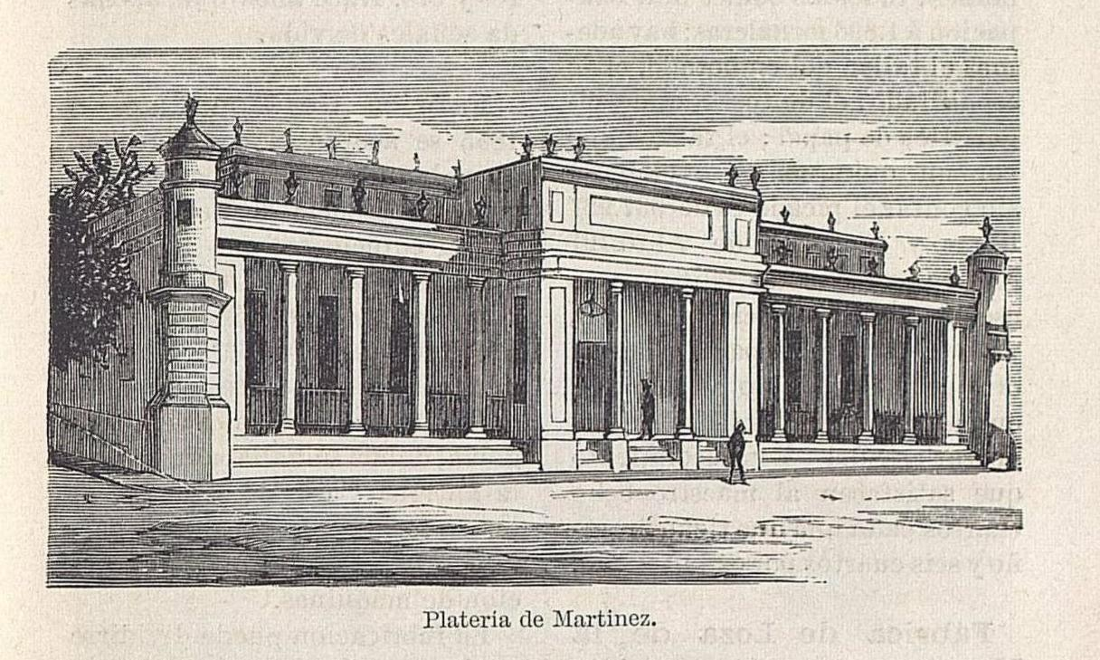 Estampa grabada del edificio de la Platería de Martínez, situado en el entorno del Paseo del Prado de Madrid, en terrenos de la calle del Gobernador y anejas adquiridos en 1777, por el platero aragonés Antonio Martínez Barrio. El edificio, según anota Mesonero Romanos, se concluyó en 1792.